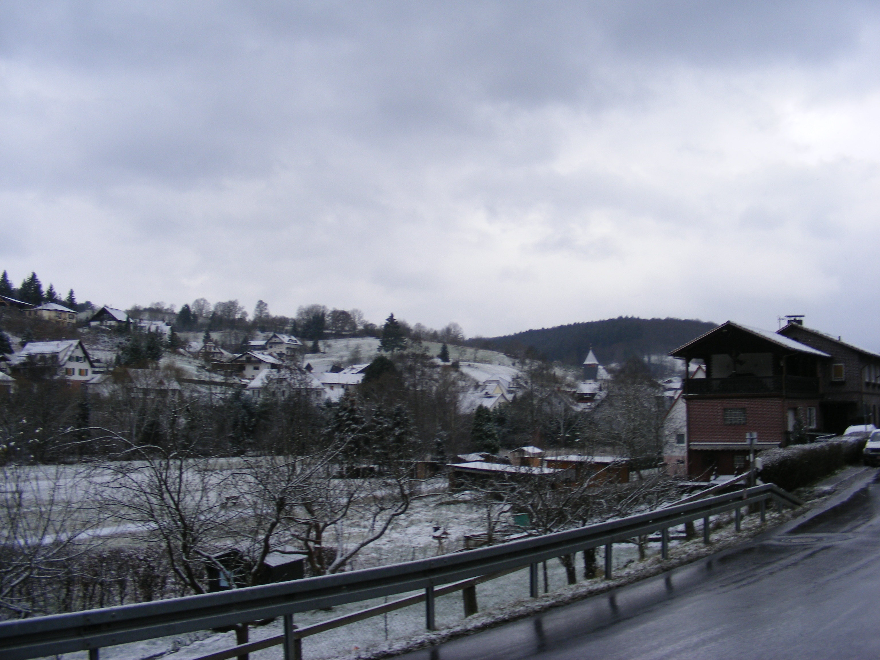 Jossa (Gemeindeteil von Sinntal, Main-Kinzig-Kreis, Hessen.), Teilansicht.